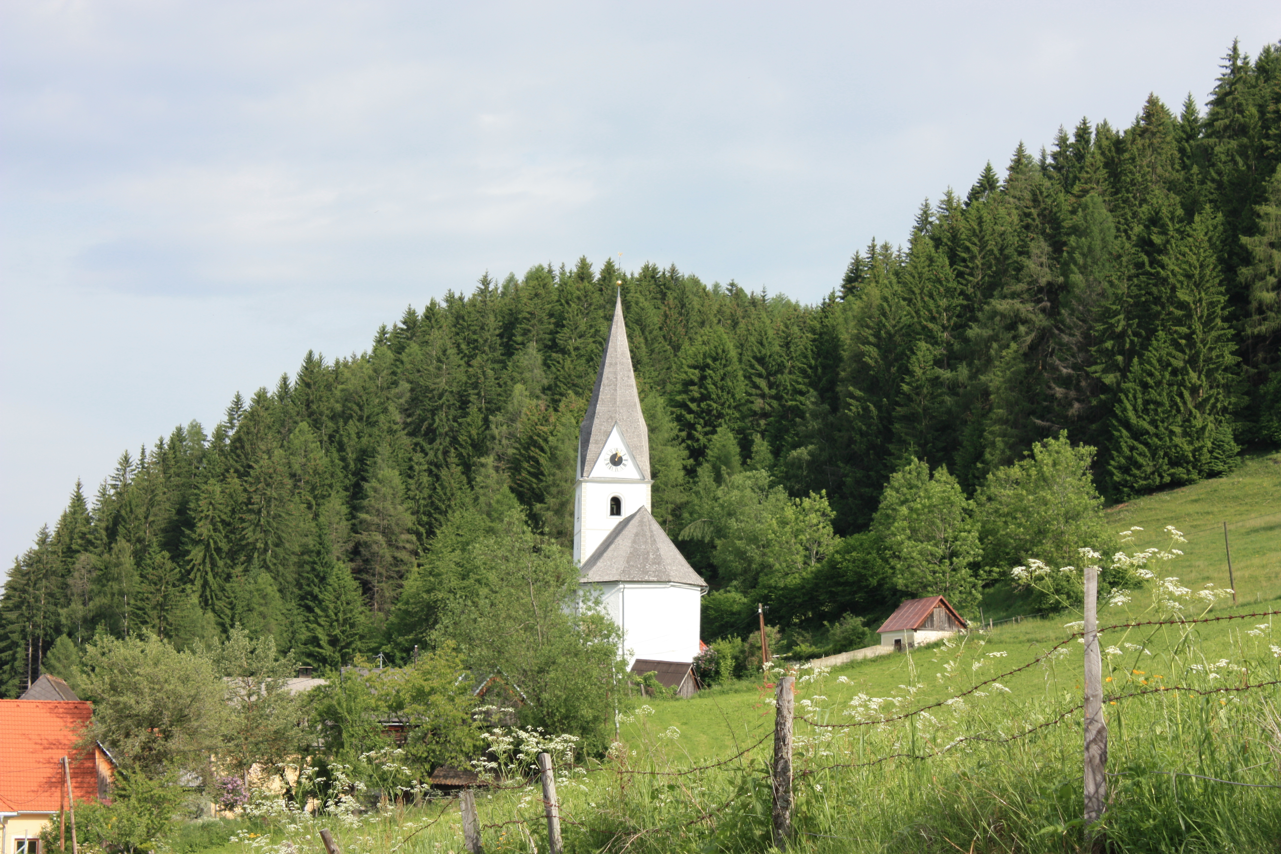 Kath. Pfarrkirche hl. Margaretha mit ummauertem Friedhof, Noreia